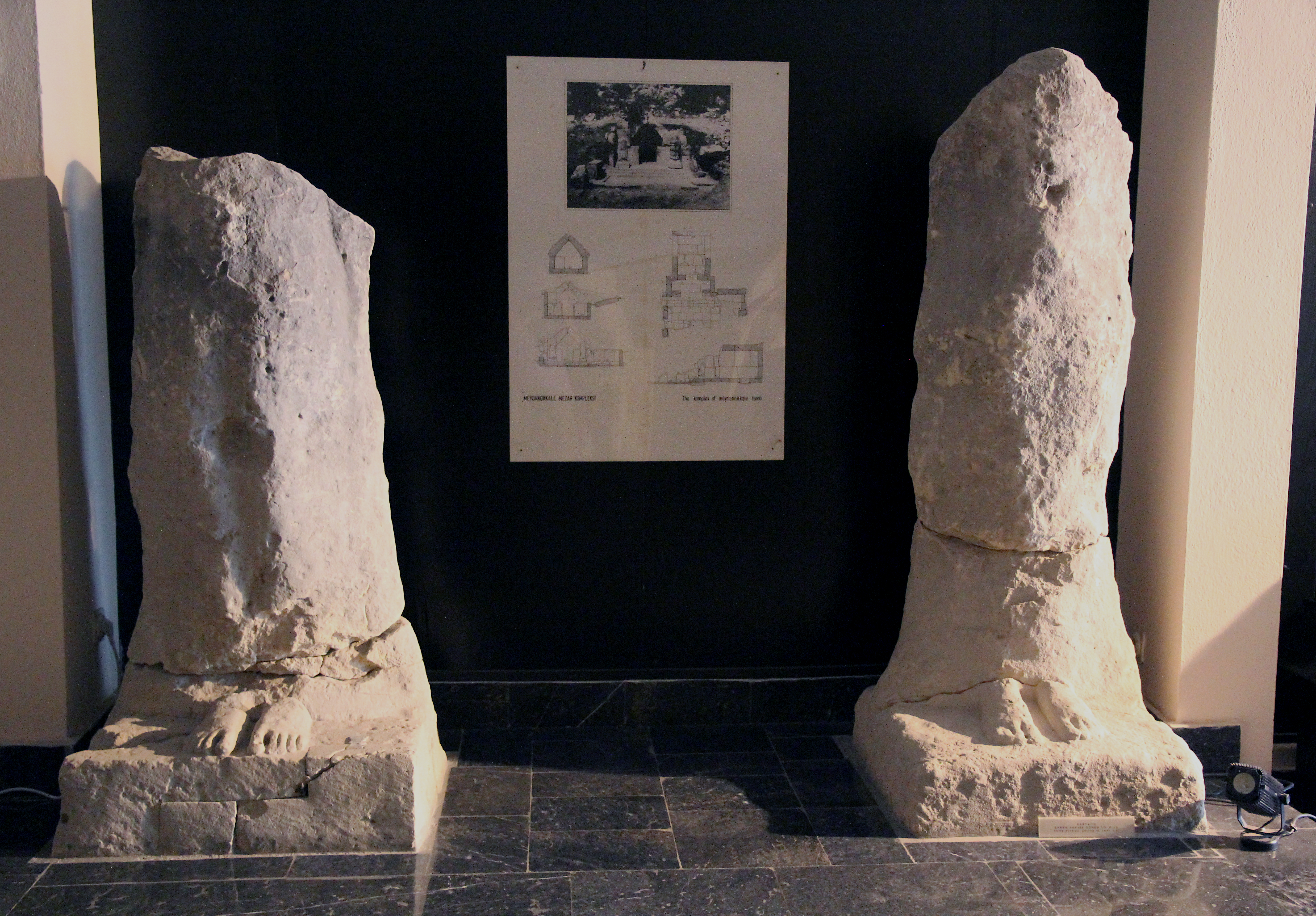 Archäologisches Museum Silifke, Südtürkei, Karyatiden eines Mausoleums aus Kiršu (Meydancıkkale)